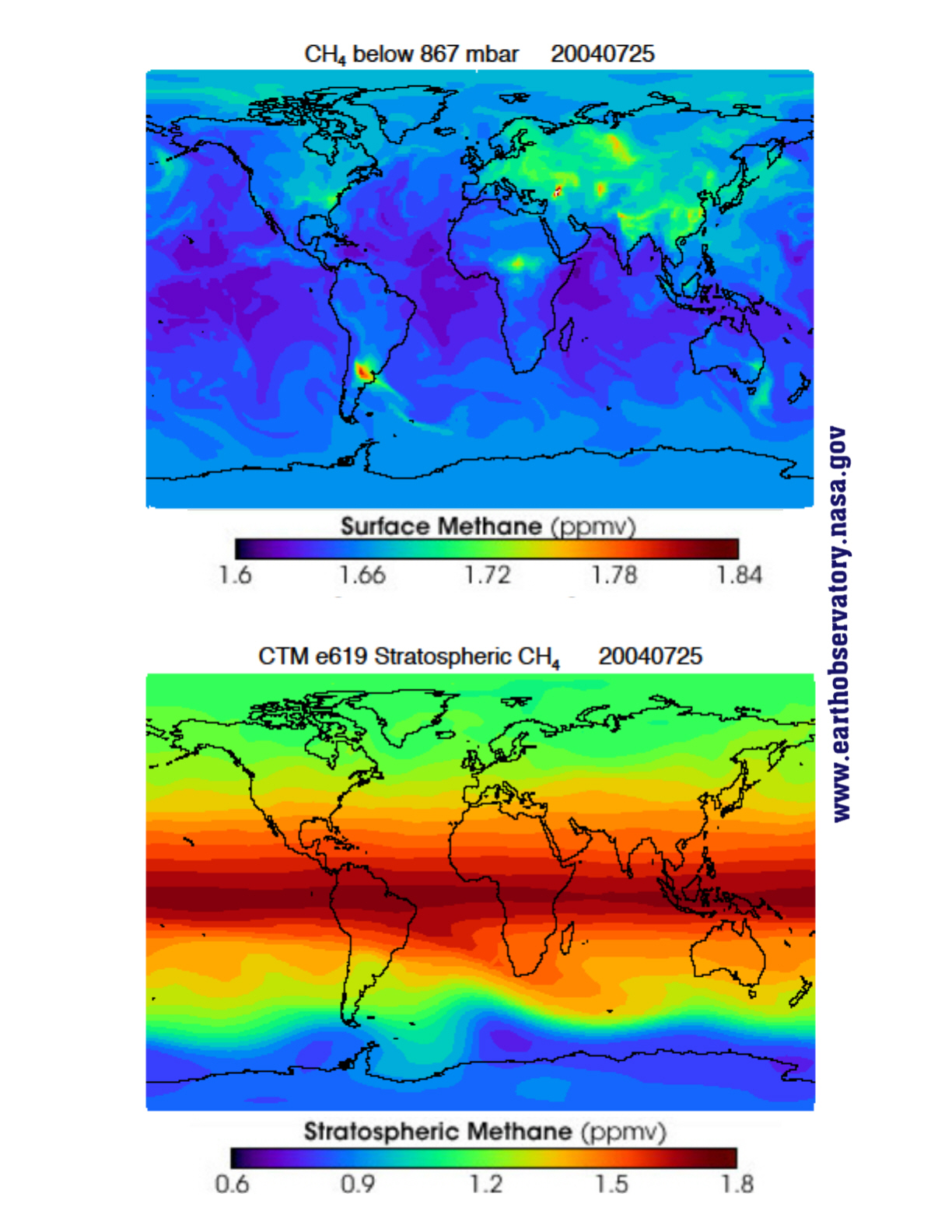 globale Verteilung von Methan in Oberflächennähe und in der Stratosphäre